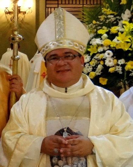 Foto Monseñor Trino